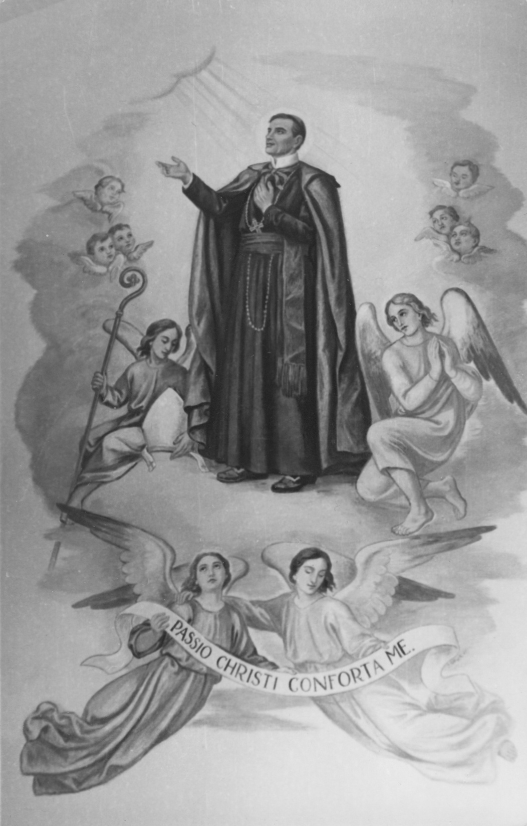 Prachatice, Neumanneum, nástěnná malba v kapli sv. Jana Nepomuka Neumanna (původně jeho rodný pokoj). Malba byla zničena po vyhnání milosrdných sester v roce 1949.